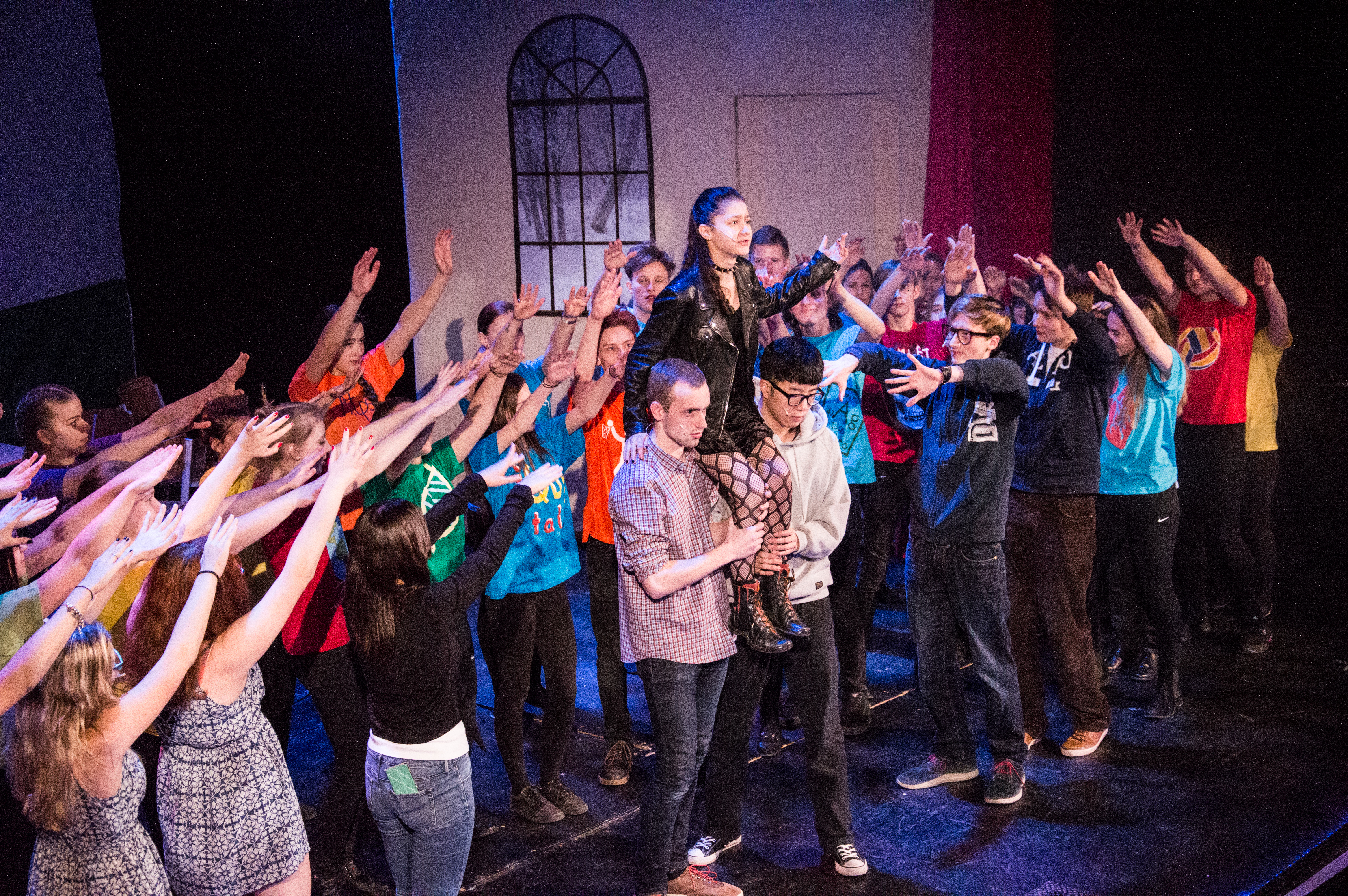 Muzikál Židle v kruhu – uprostřed fotky mají Fidelu na ramenou Rebel a jeden z Geeků.